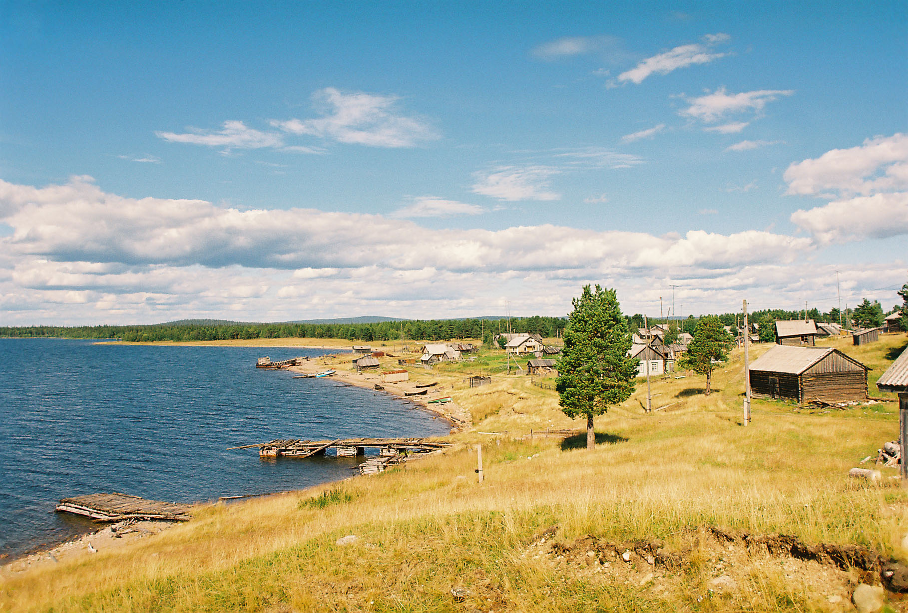 Зашеек